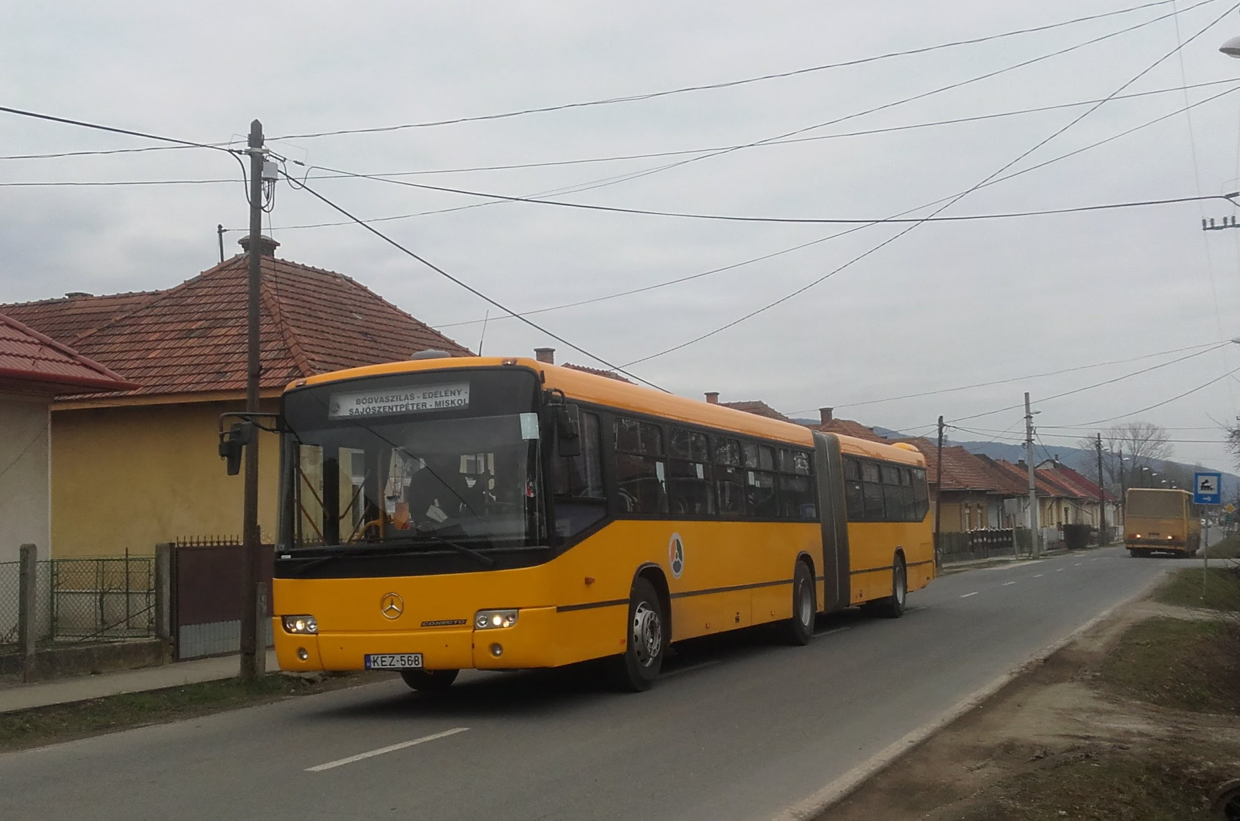 Az ÉMKK KEZ-568 rendszámú Mercedes Conecto busza Bódvaszilason, a 3707-es helyközi járaton.